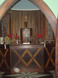 Interior do Castelo Montebello Medieval, em Teresópolis/RJ.